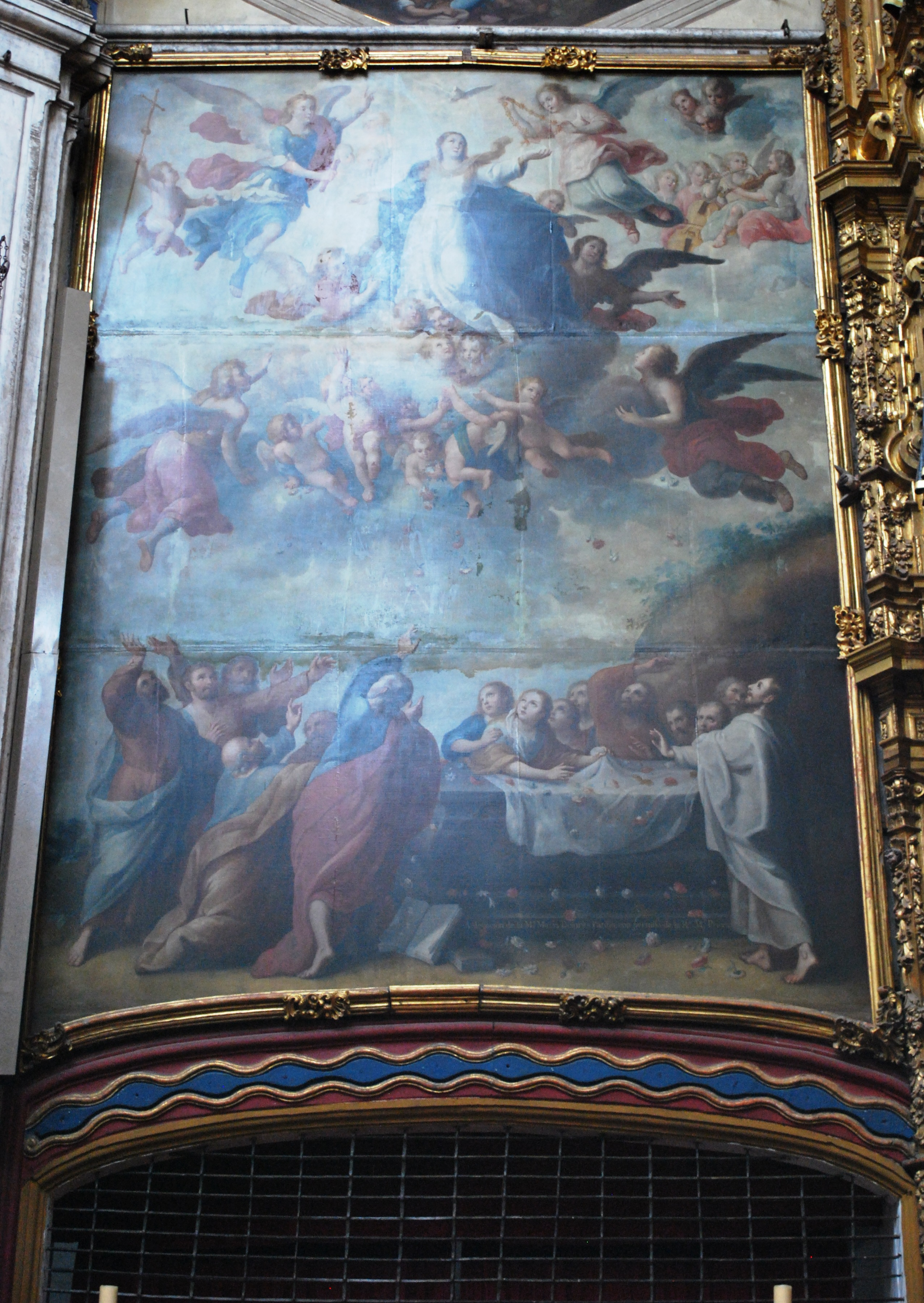 Lienzo de la Asunción de María en la Iglesia de la Enseñanza, en la Ciudad de México.